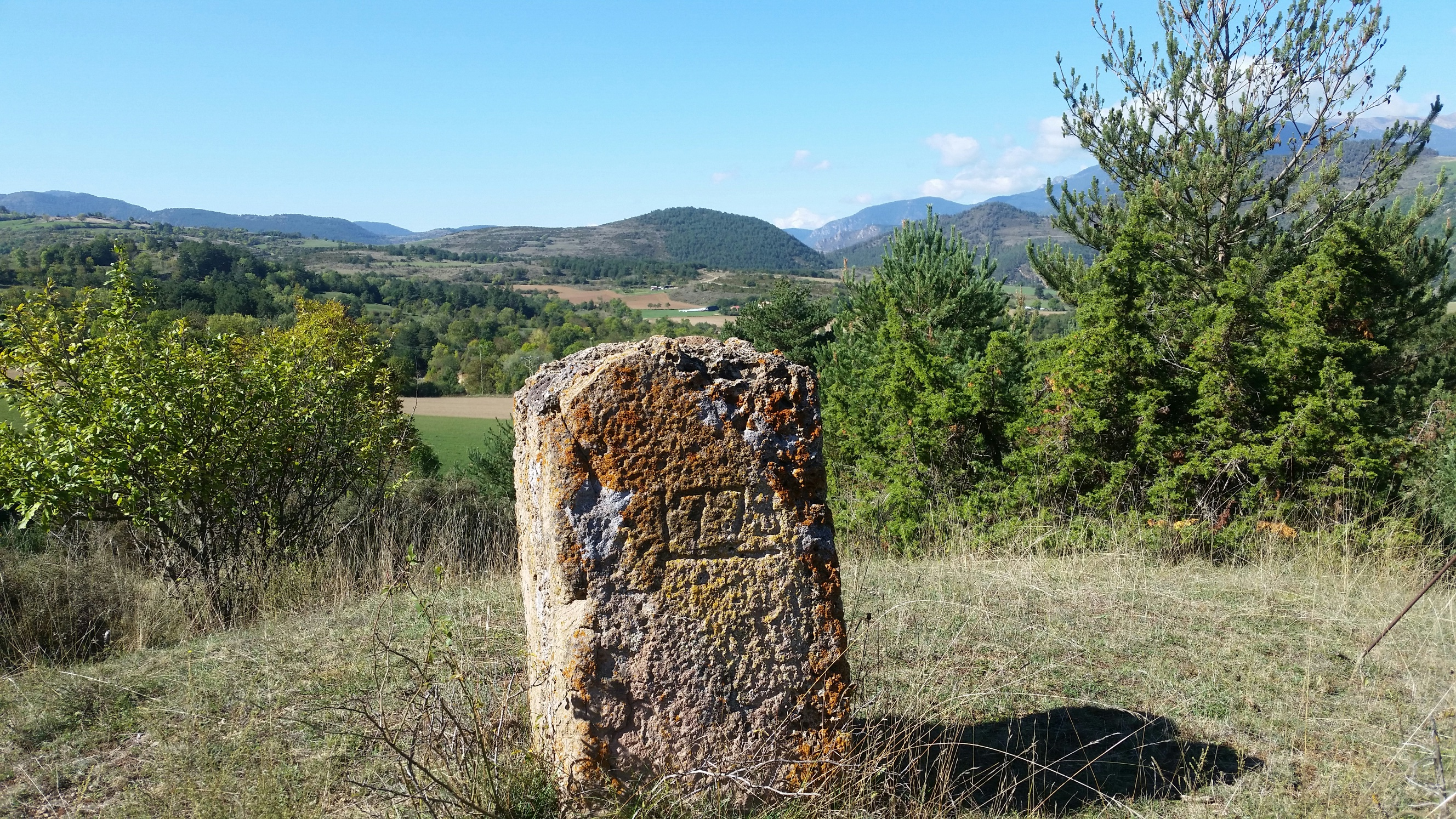 Roc Pedró